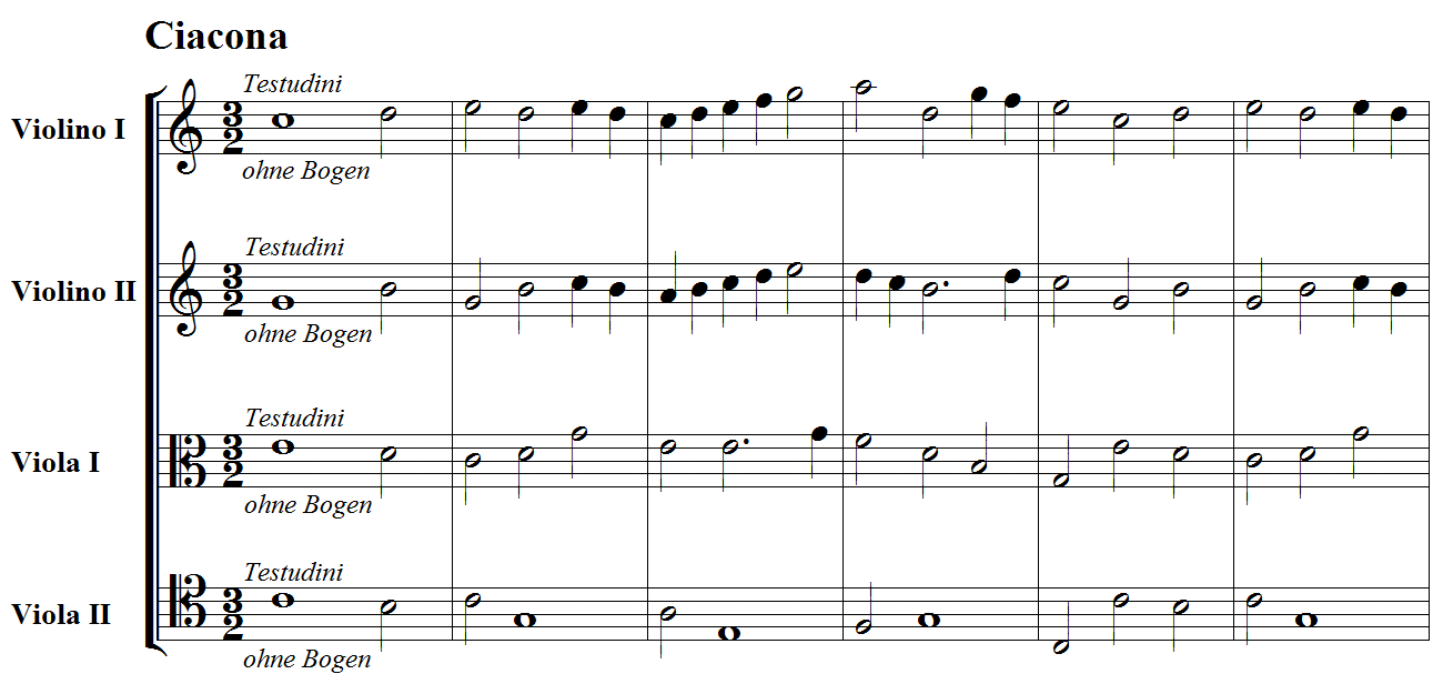 Premières mesures de la Ciacona (4e mouvement) de la Sérénade de Biber (1670)